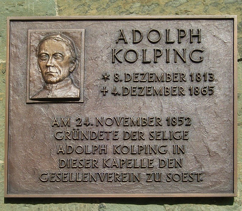 Sankt Nikolai-Kapelle in Soest